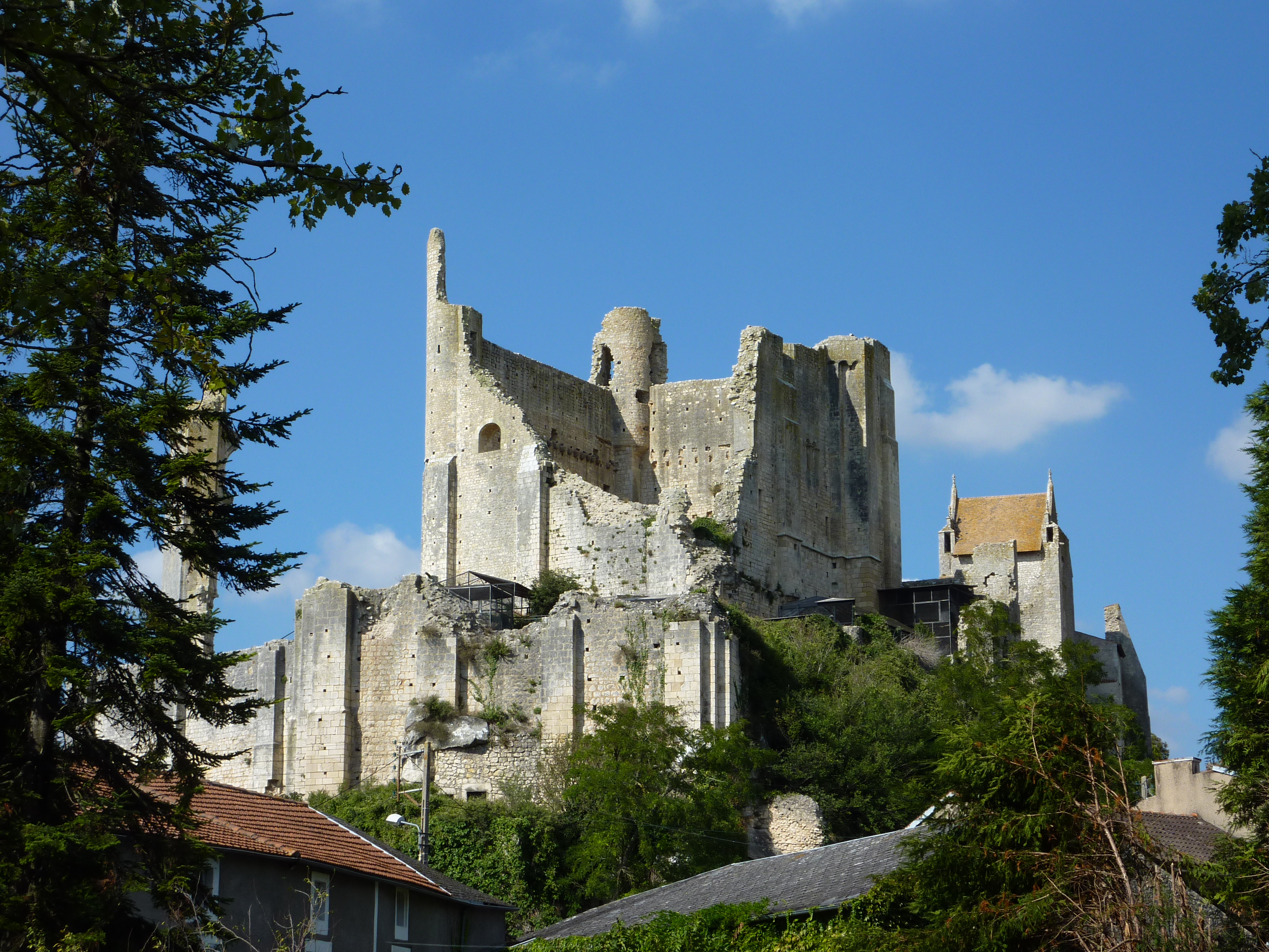 Ruines du château baronnial de Chauvigny (Vienne, France)